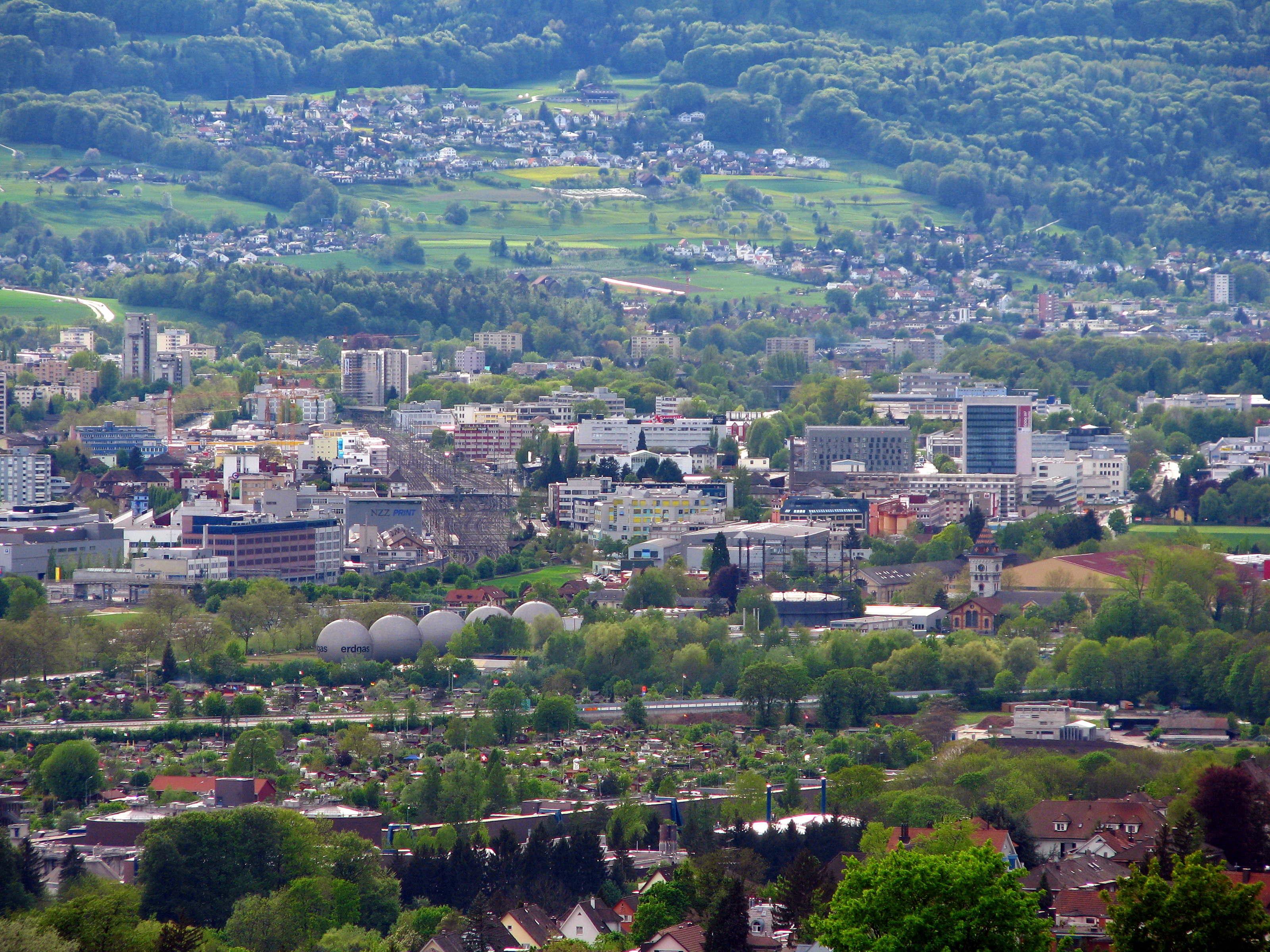 Schlieren, Bergdietikon (to the left) and Dietikon (to the right) in Limmtatal, seen from Käferberg-Waidberg in Zürich